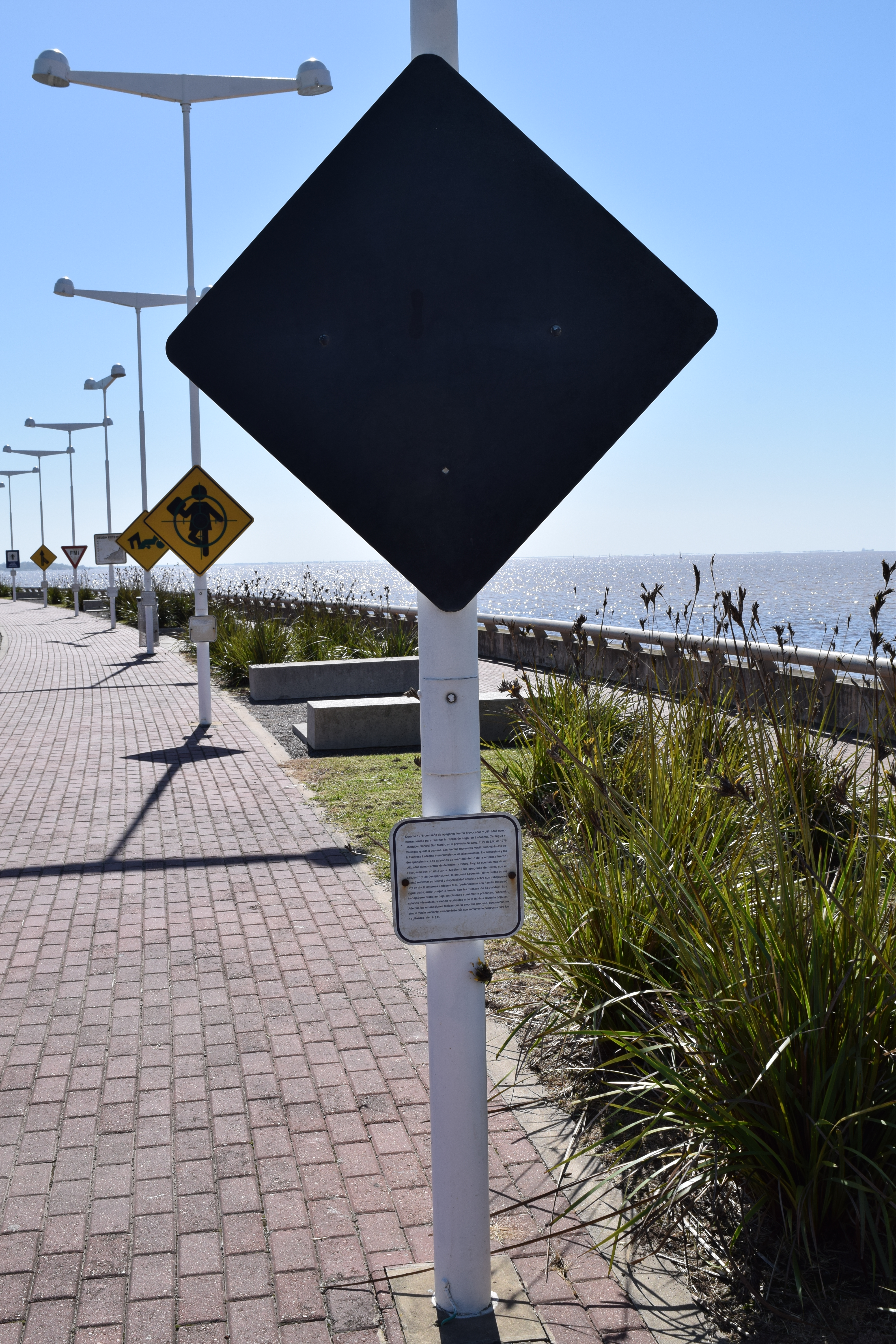 Carteles de la memoria 1999–2010 | Intervención urbana. 53 carteles viales de 2,60 m c/u. Hierro galvanizado y laminado reflectivo